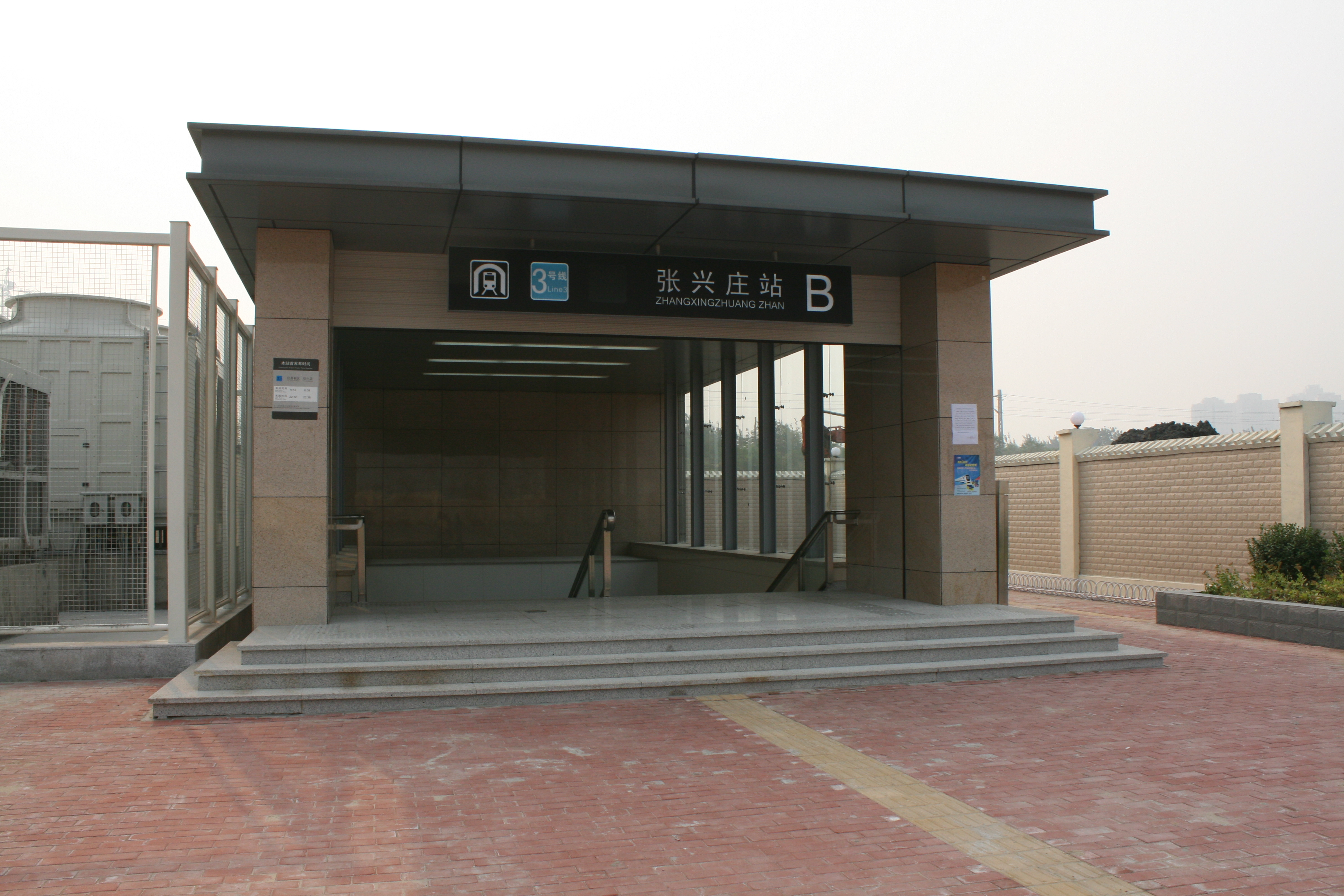 天津地鐵三號線張興莊站B出口 0001